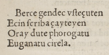 Etxepareren Kontrapas olerkia